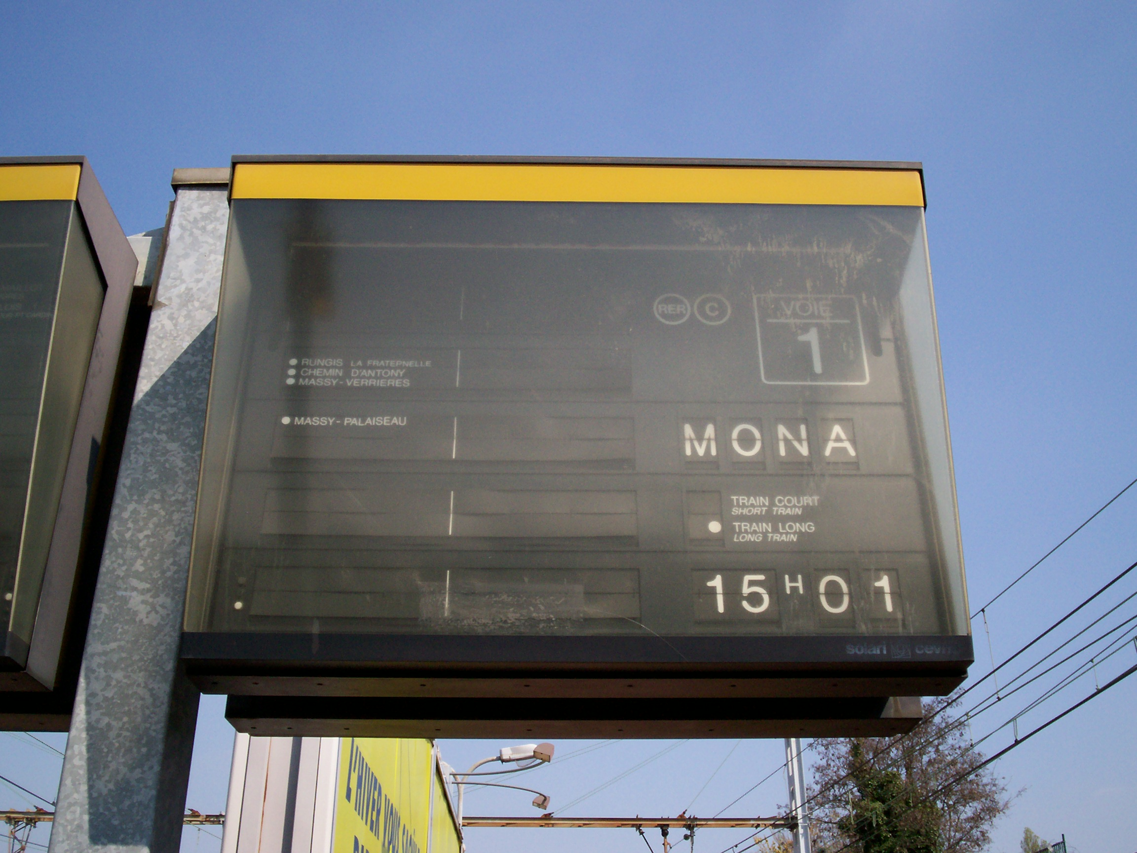 Infogare Train MONA à Pont de Rungis RER C